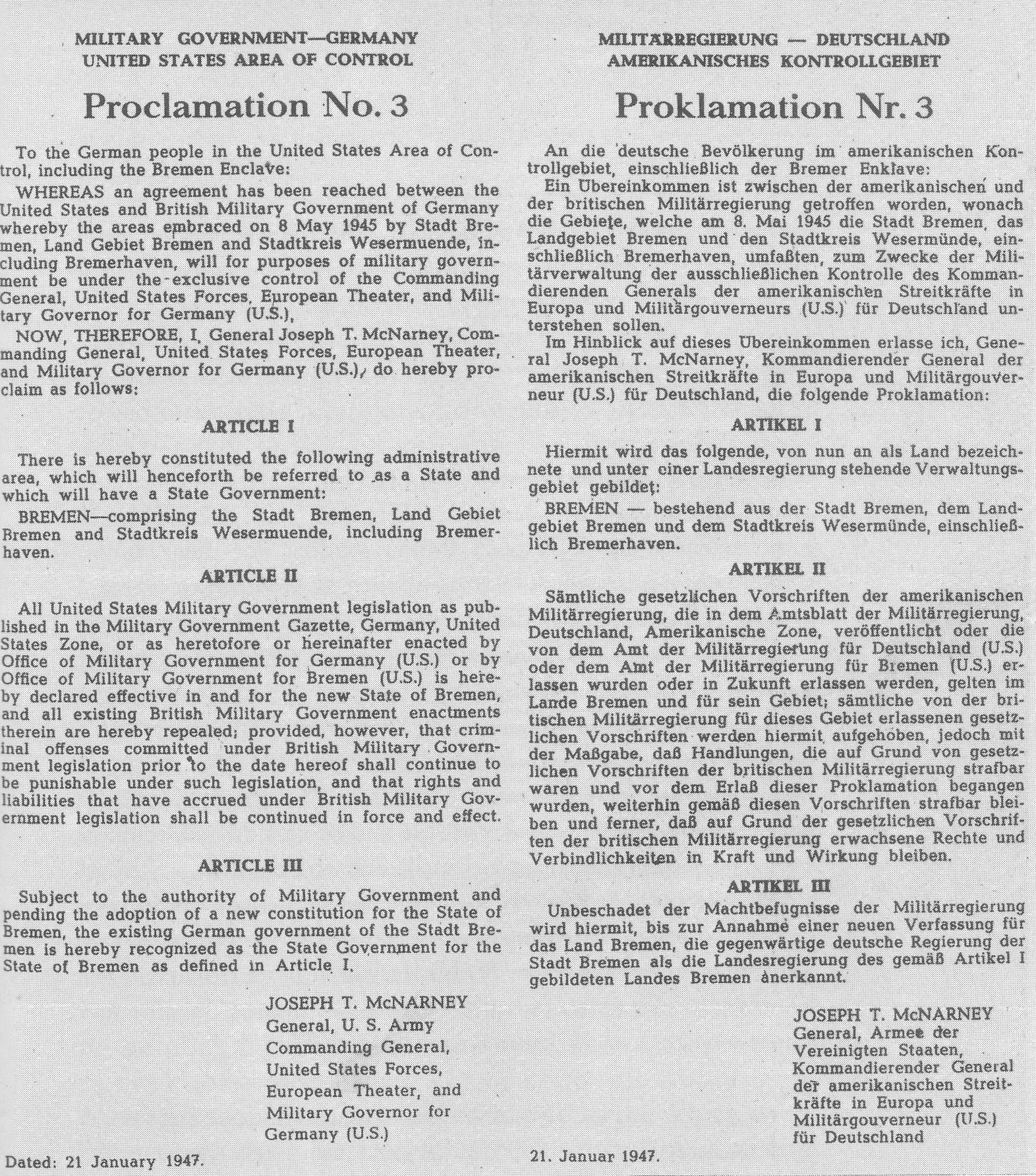 Am 21. Januar wurde rückwirkend zum 1. Januar 1947 mit der Proklamation Nr. 3 die Bildung des Landes Bremen verkündet, das aus der Stadt Bremen, dem Landgebiet Bremen, dem Stadtkreis Wesermünde und dem Bremischen Hafen an der Wesermündung bestand.